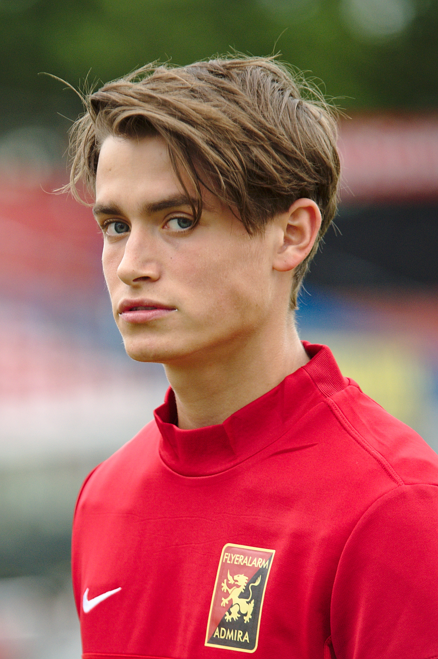 Saisonvorbereitungsspiel Admira Wacker Mödling gegen Kapfenberger SV am 17.6.2017, Bild zeigt: Wilhelm Vorsager